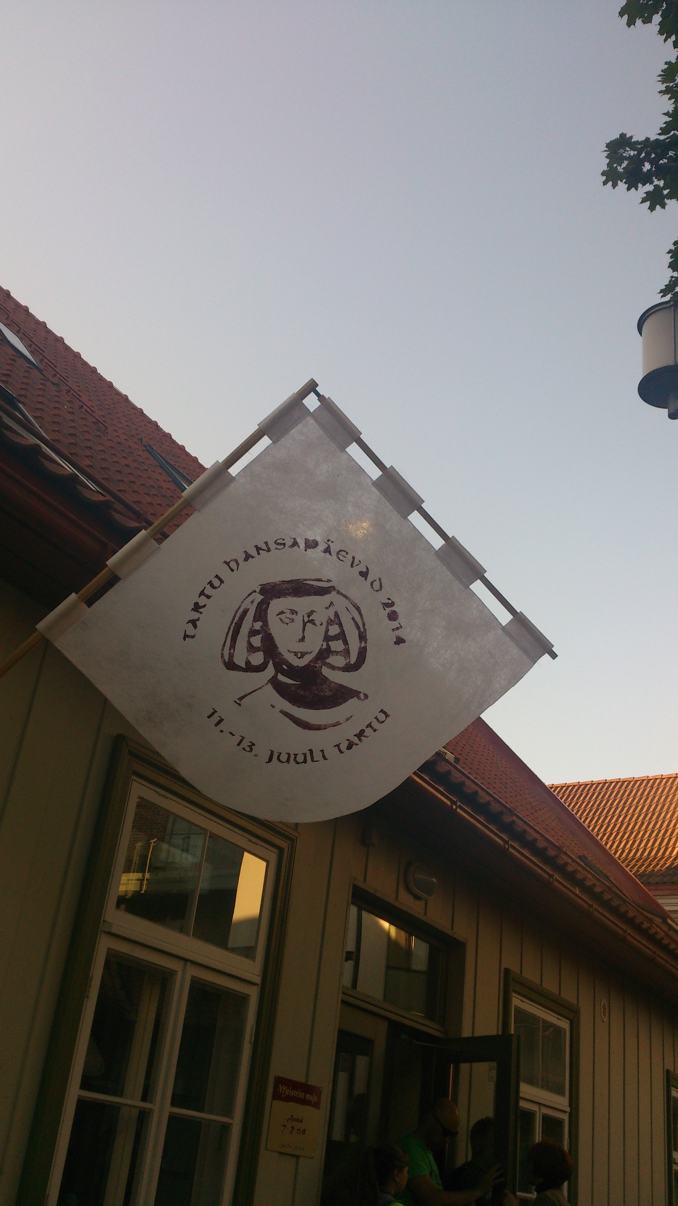 Tartu Hansapäevade logoga lipp Antoniuse õues, 10. juuli 2014